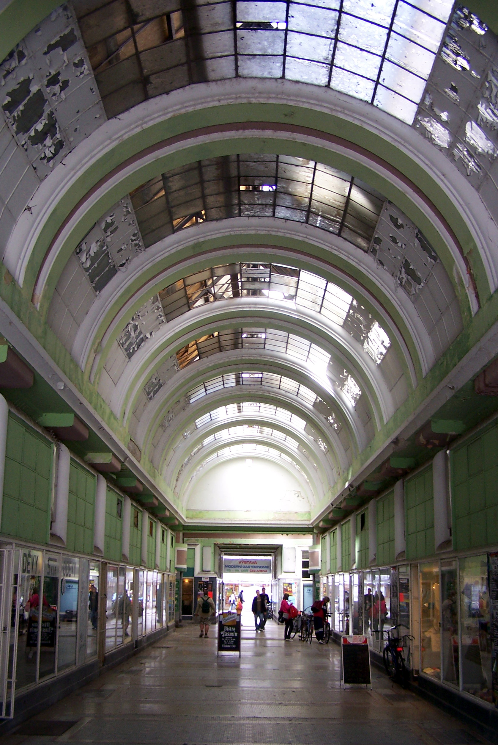 Machoňova pasáž, stav před rekonstrukcí.